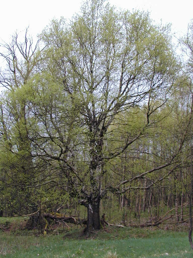 Popovská bříza